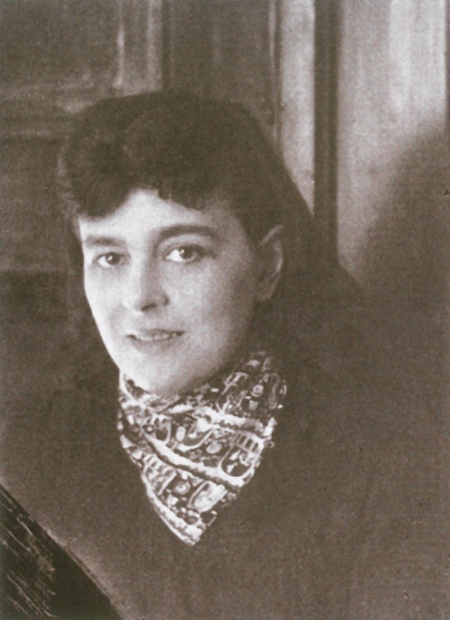 Александра фон Вольф